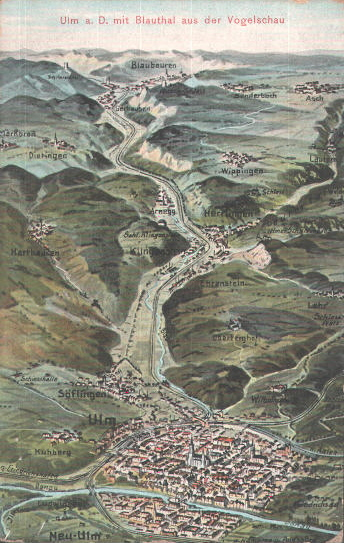 Ulm a. D. mit Blautal aus der Vogelschau